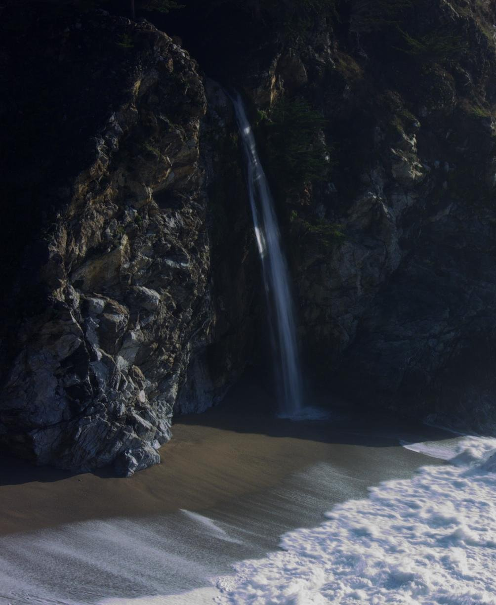 McWay Falls, Big Sur, CA